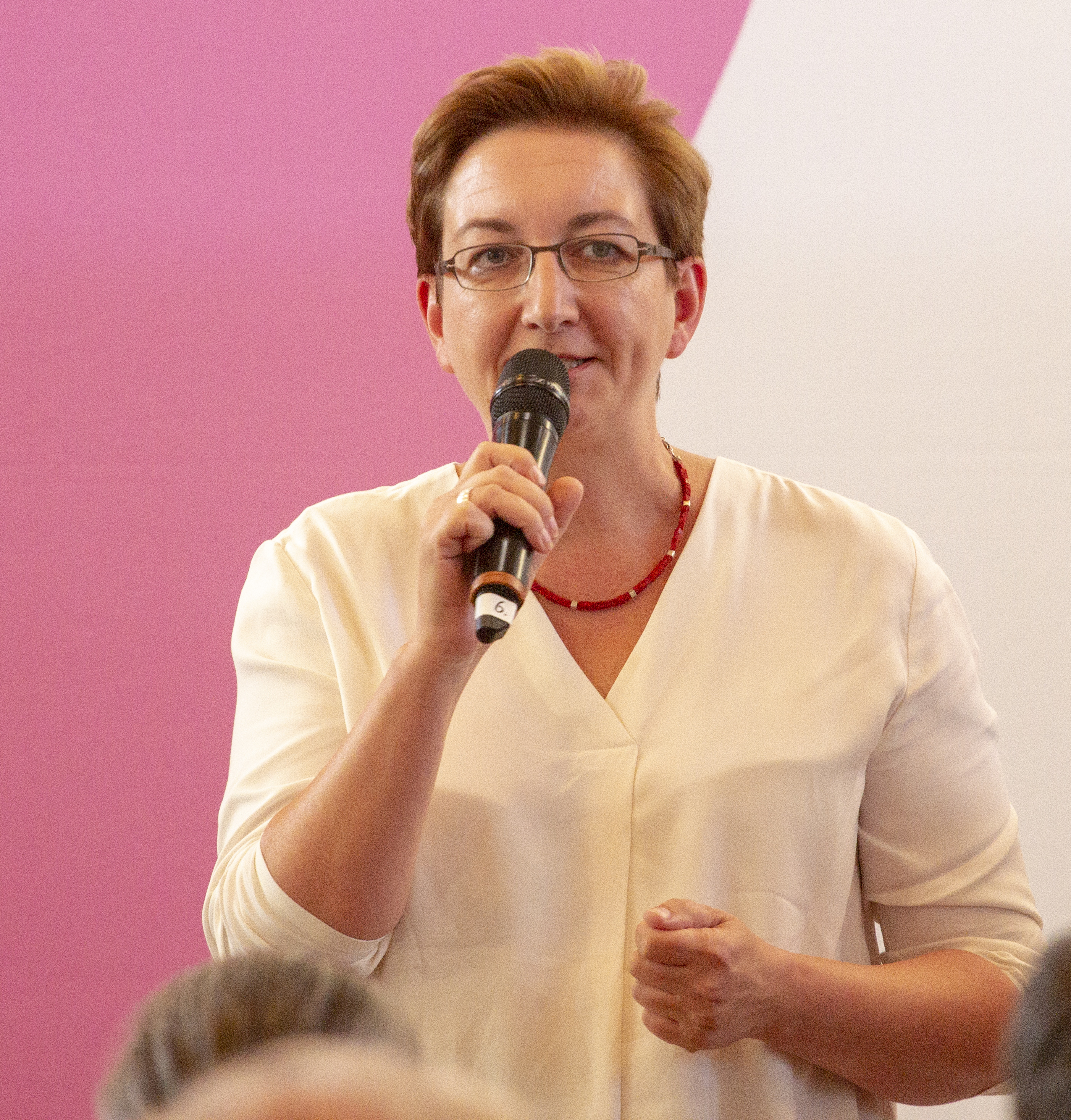 Klara Geywitz bei der SPD Regionalkonferenz zur Wahl des SPD-Vorsitzes am 10. September 2019 in Nieder-Olm.